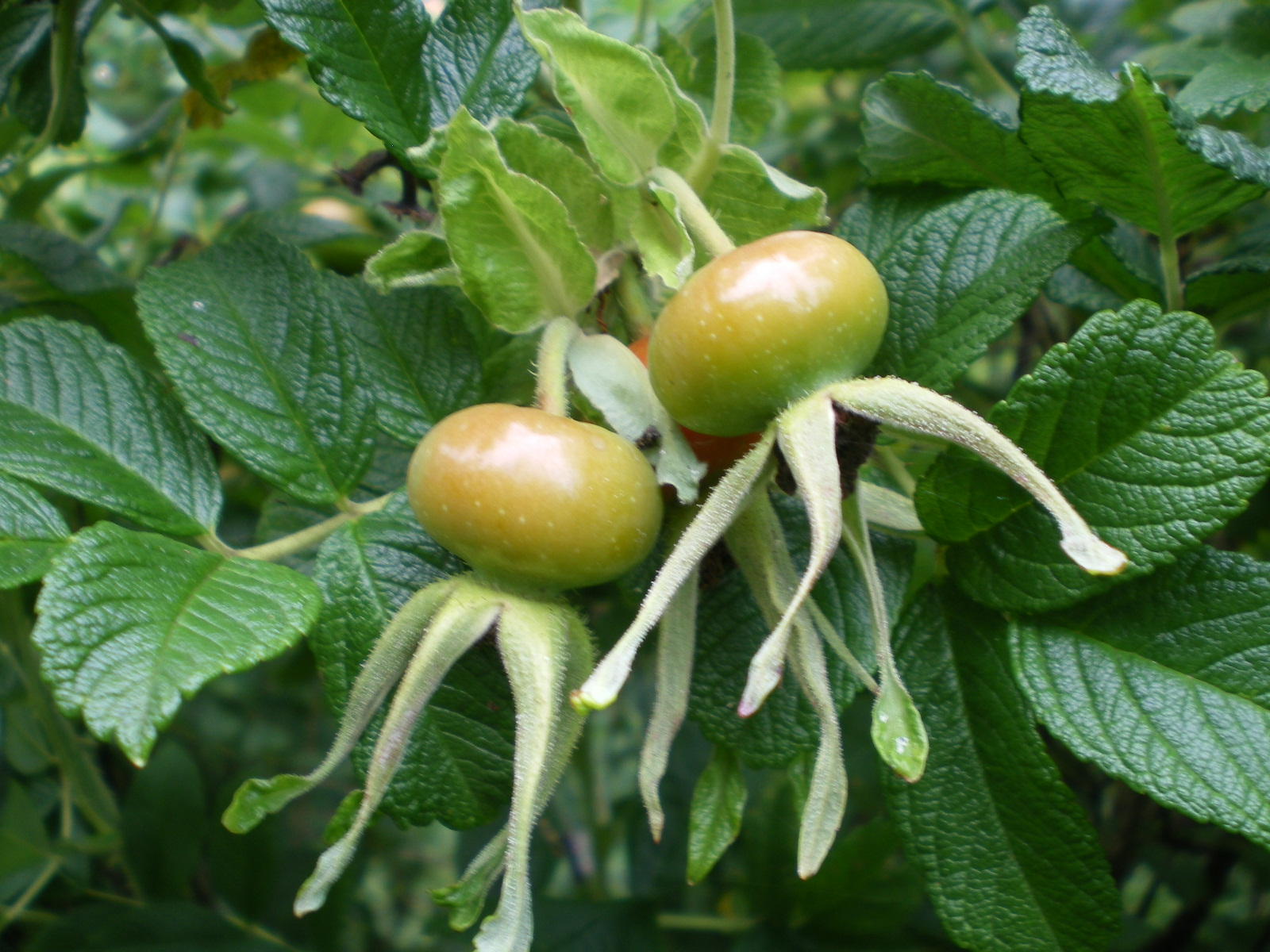 Rosa rugosa, photo made on a dune in Ustronie Morskie, Poland